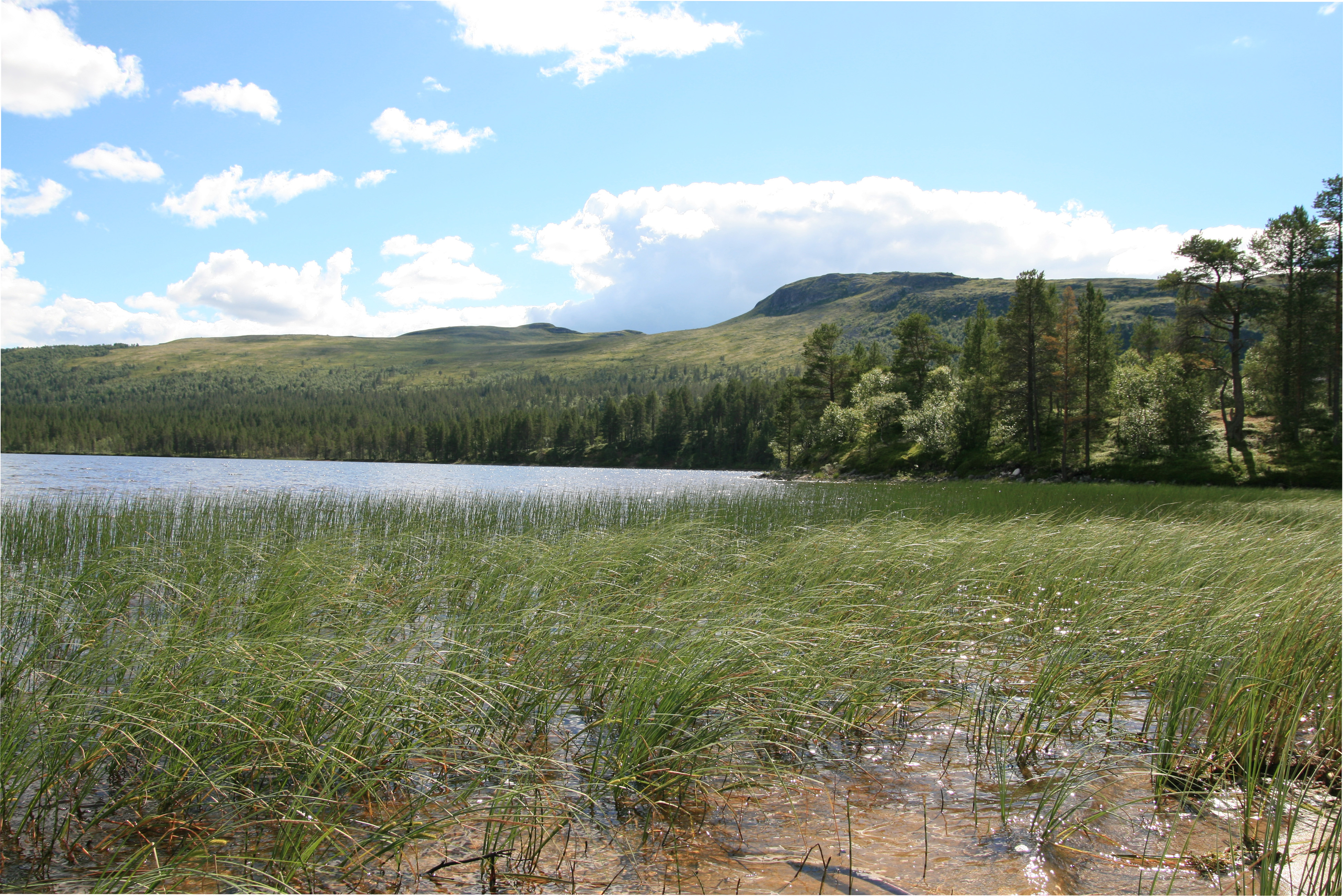 Røros, Norway